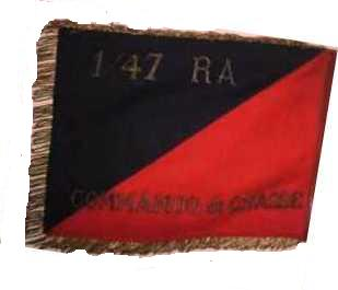 Fanion Commando de chasse